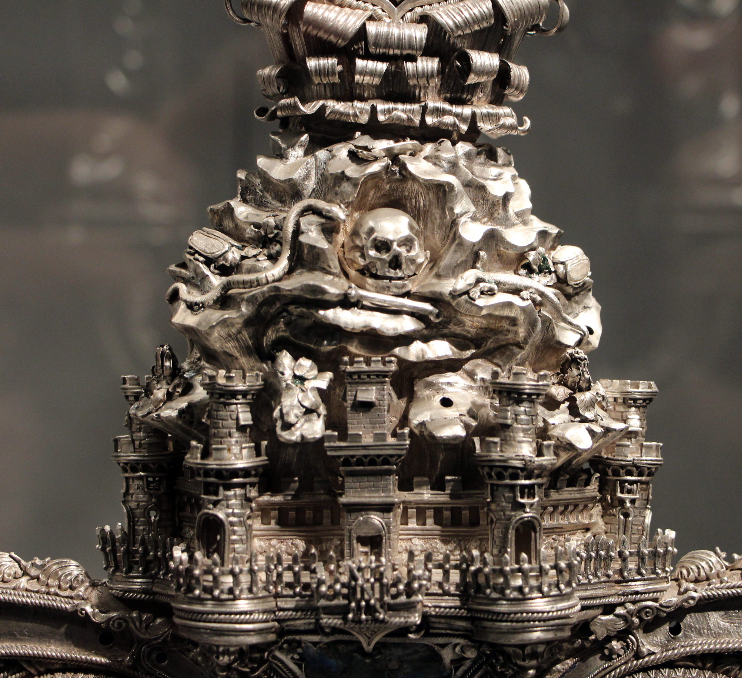 Croce-ostensorio dell'Opera del Duomo (Firenze)